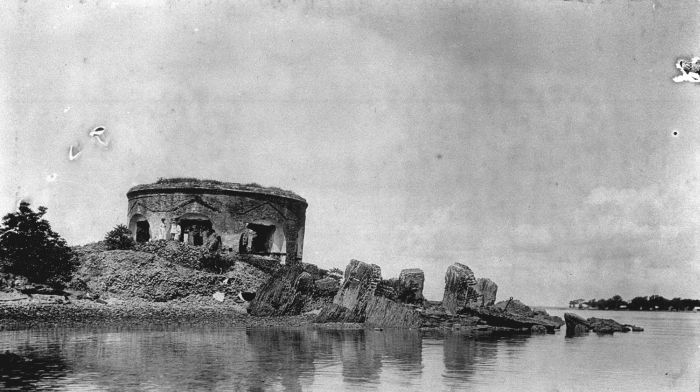 Foto. De ruïne van het Portugese fort op het eiland Kerkhof in de Baai van Batavia